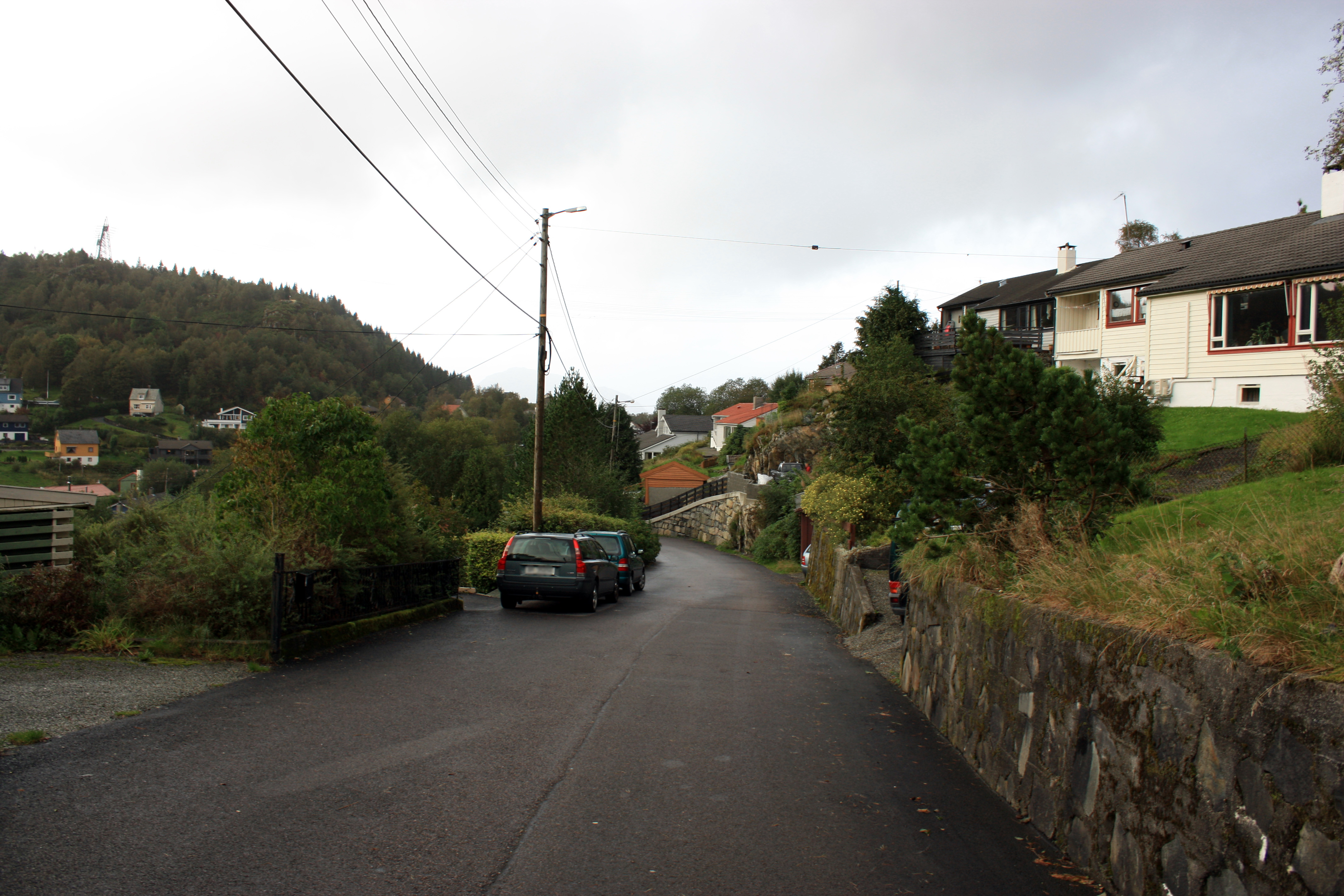 Nordre Vallavegen, Fana, Bergen.